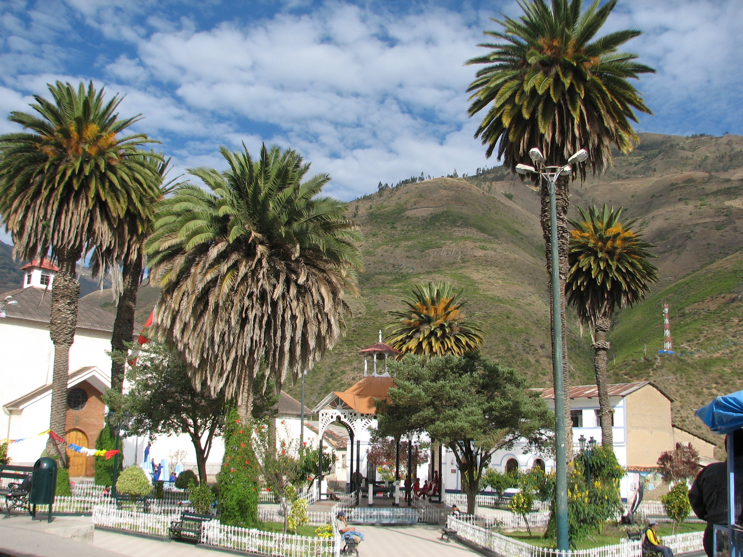 Central plaza in Abancay, Apurímac, Peru.